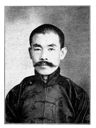 中文（台灣）: 中華民國國會議員